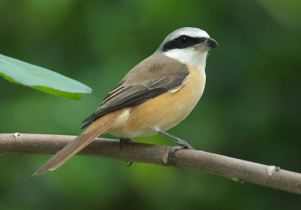 台灣常見冬候鳥。